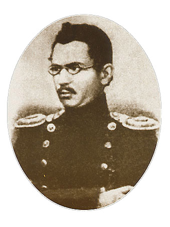 Mykola Illich Myklukha